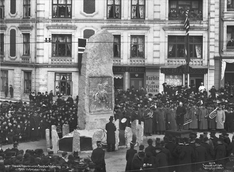 Harald Haardraades Bautas Afsløring Oslo 26 Oktober 1905. bautastein, avduking, publikum, musikkorps, bygård, bakeriutsalg, frisørsalong.